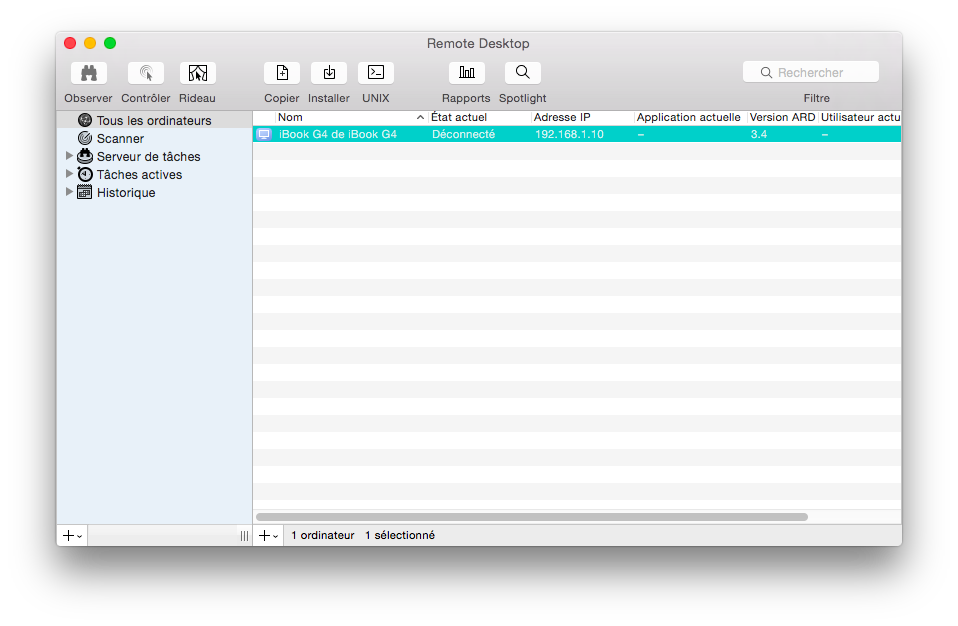 Capture d'écran de la fenêtre principale du logiciel Apple Remote Desktop.